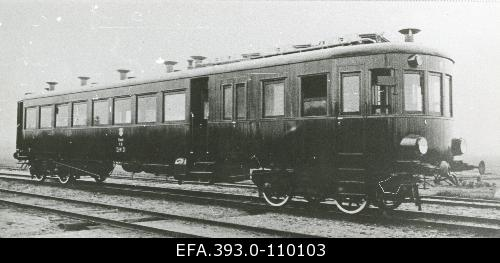 Первый дизельный вагон, построенный на Главных заводах Балтийской железной дороги